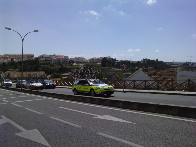 Carro de apoio da equipa Efapel-Glassdrive na Volta a Portugal de 2012 a passar no Lugar da Paz, 26/08/2012